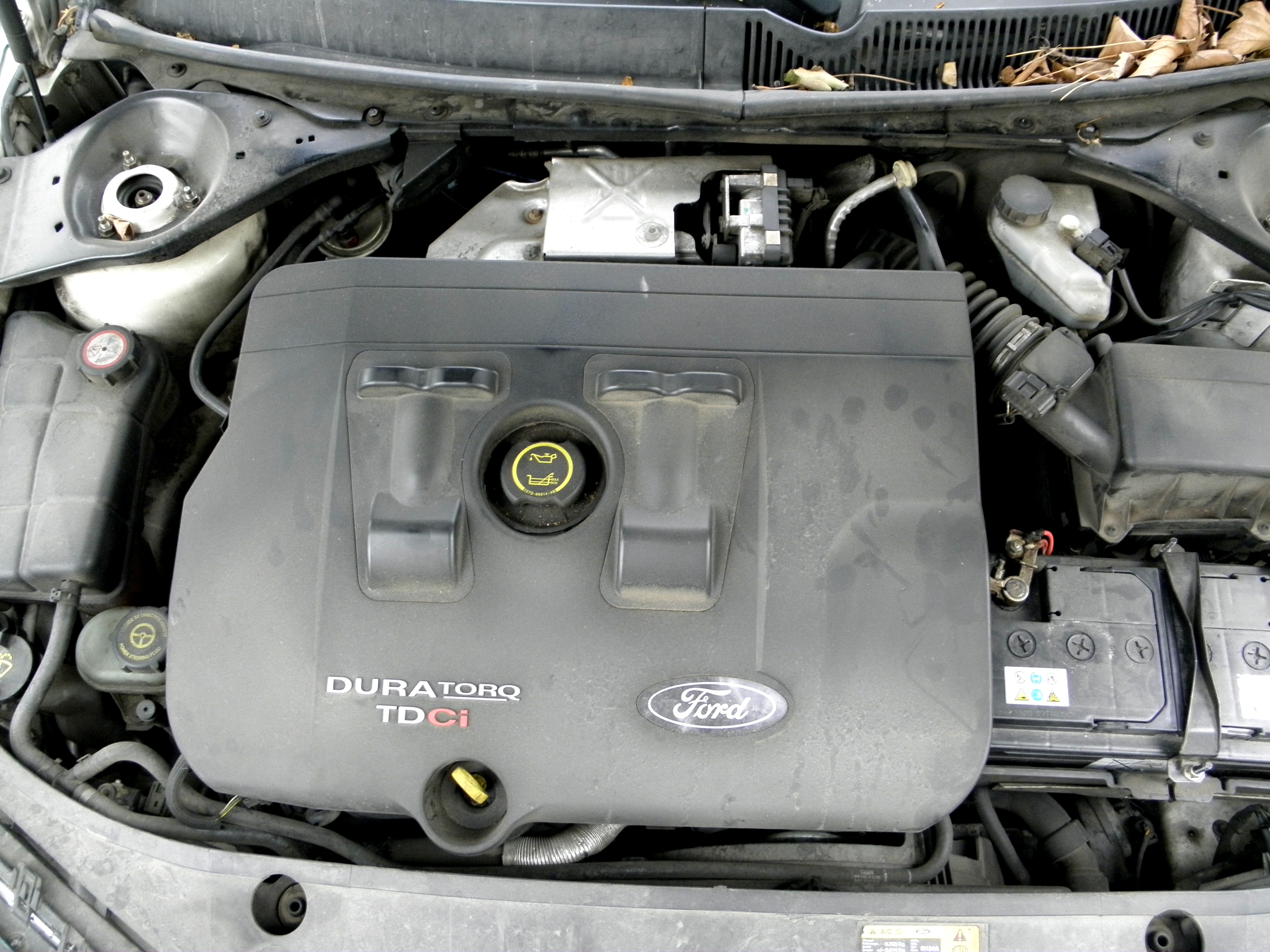 Ford Mondeo Mk3 2.0 TDCi 130, vano motore, Ford Duratorq 2.0 L (1998 cc)